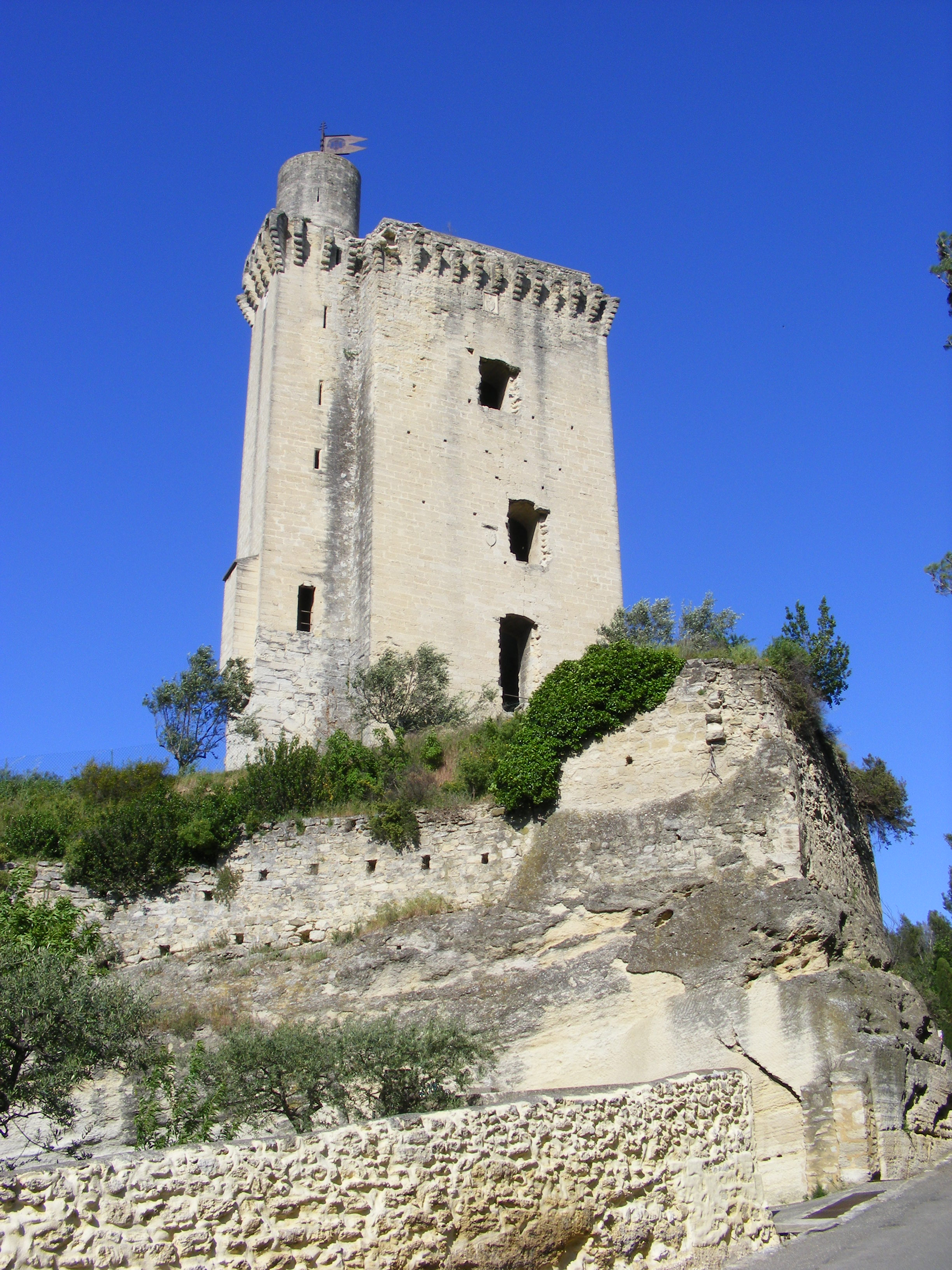 Tour Anglica - Barbentane (France) côté Sud-Ouest